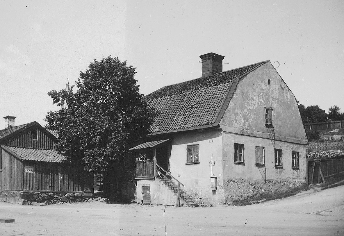 Hammarby tullgård (revs 1907)